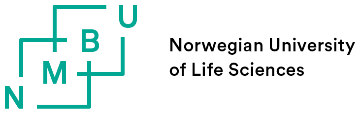 Logo der Universität für Umwelt- und Biowissenschaften in Norwegen